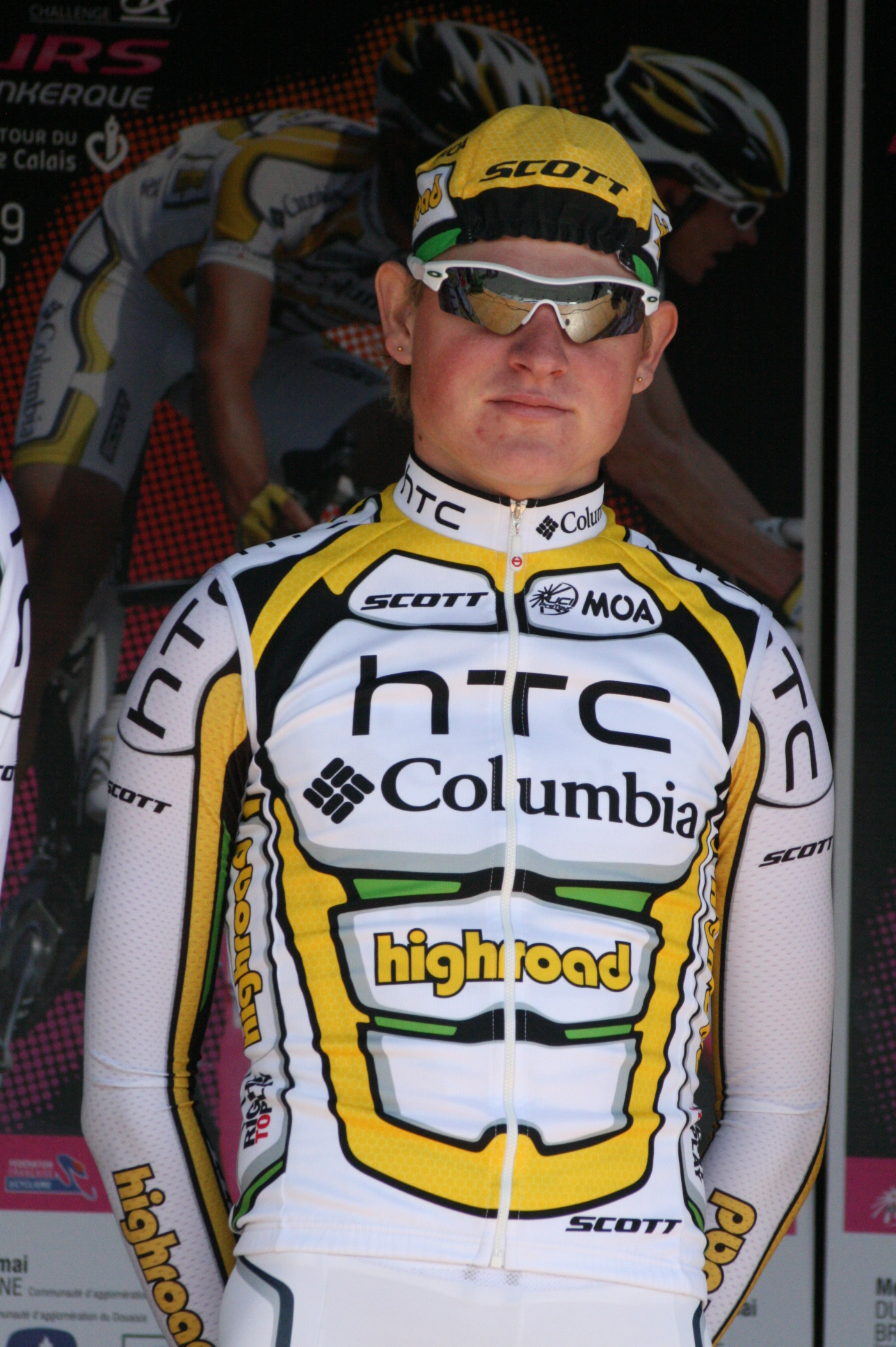 Rasmus Guldhammer lors de la présentation des équipes des 4 jours de Dunkerque 2010